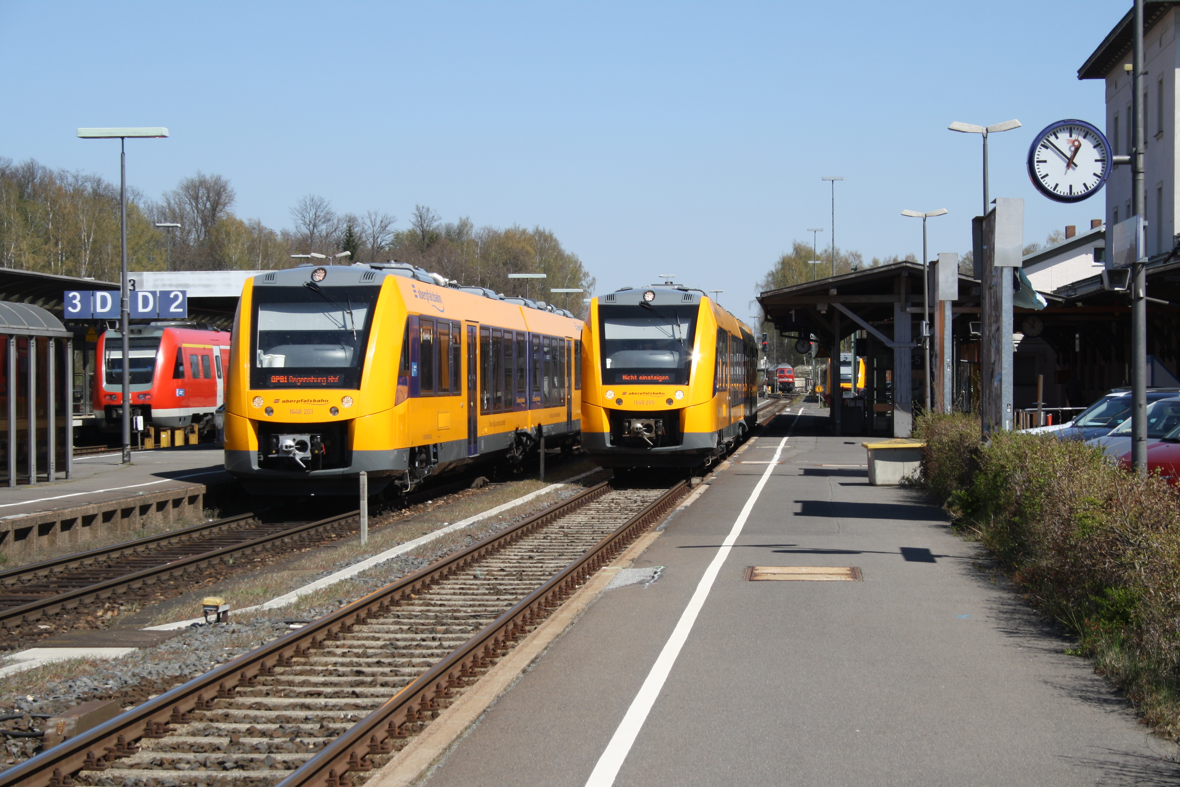 Fahrzeuge der DB und der Oberpfalzbahn im Bahnhof Marktredwitz